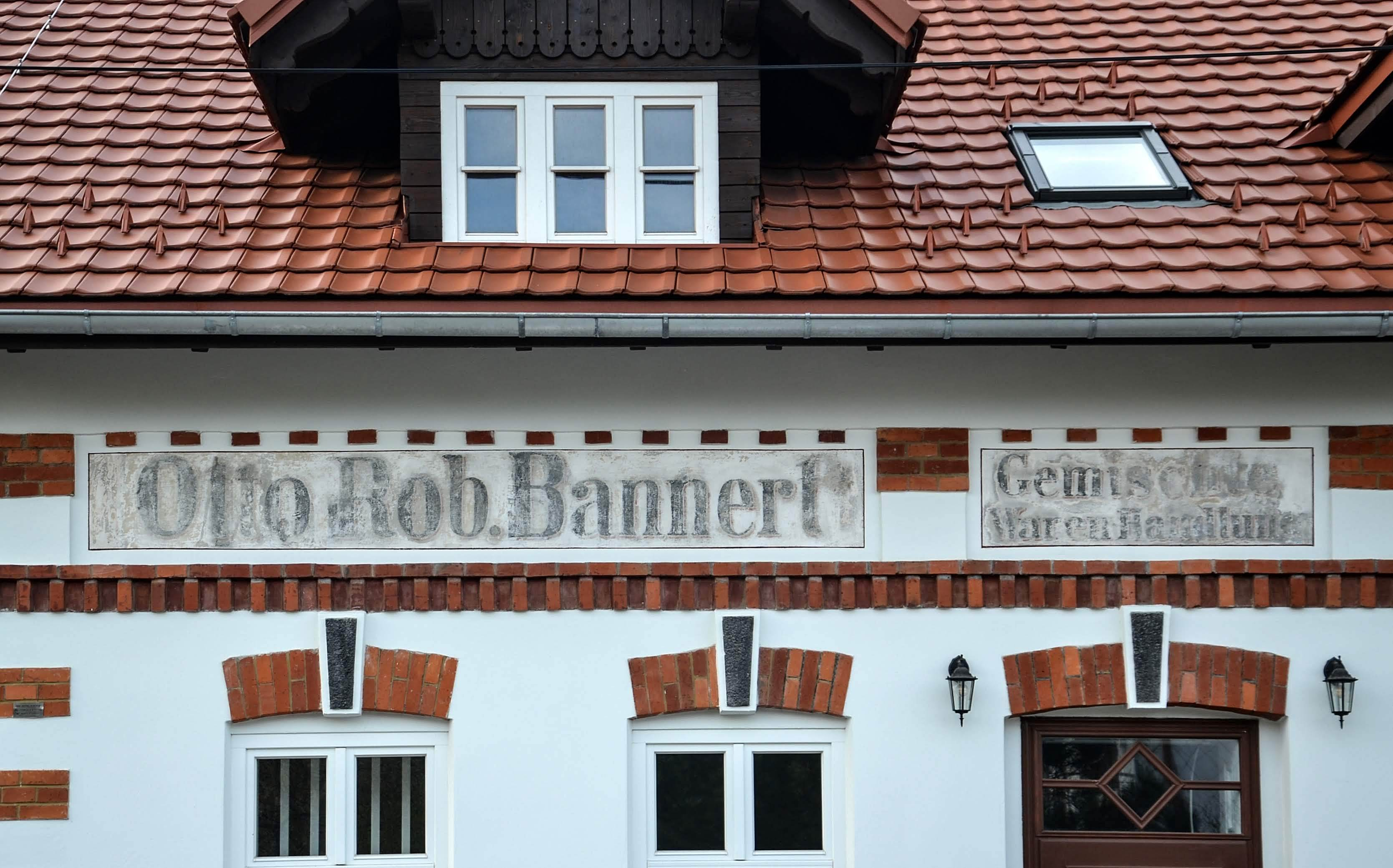 Odsłonięty niemiecki napis w Wapienicy (Lobnitz), ulica Zapora